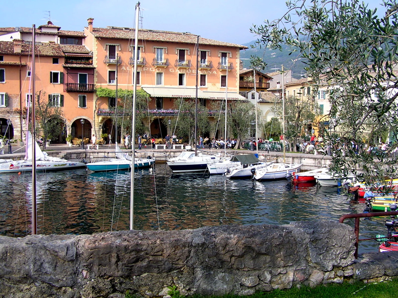 Jachthafen, Yacht harbour, Torri del Benaco, Lake Garda, Italy